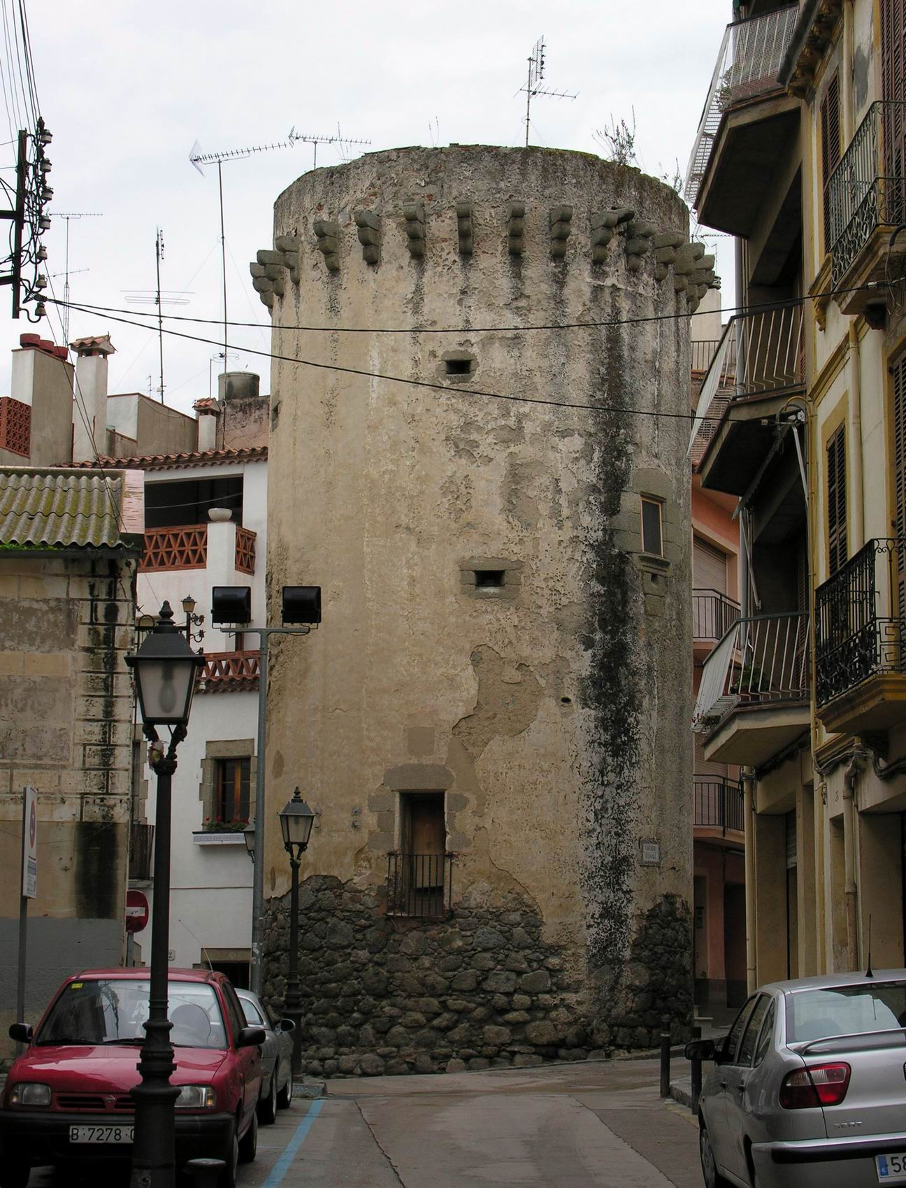 Torre d'en Llobet, Arenys de Mar